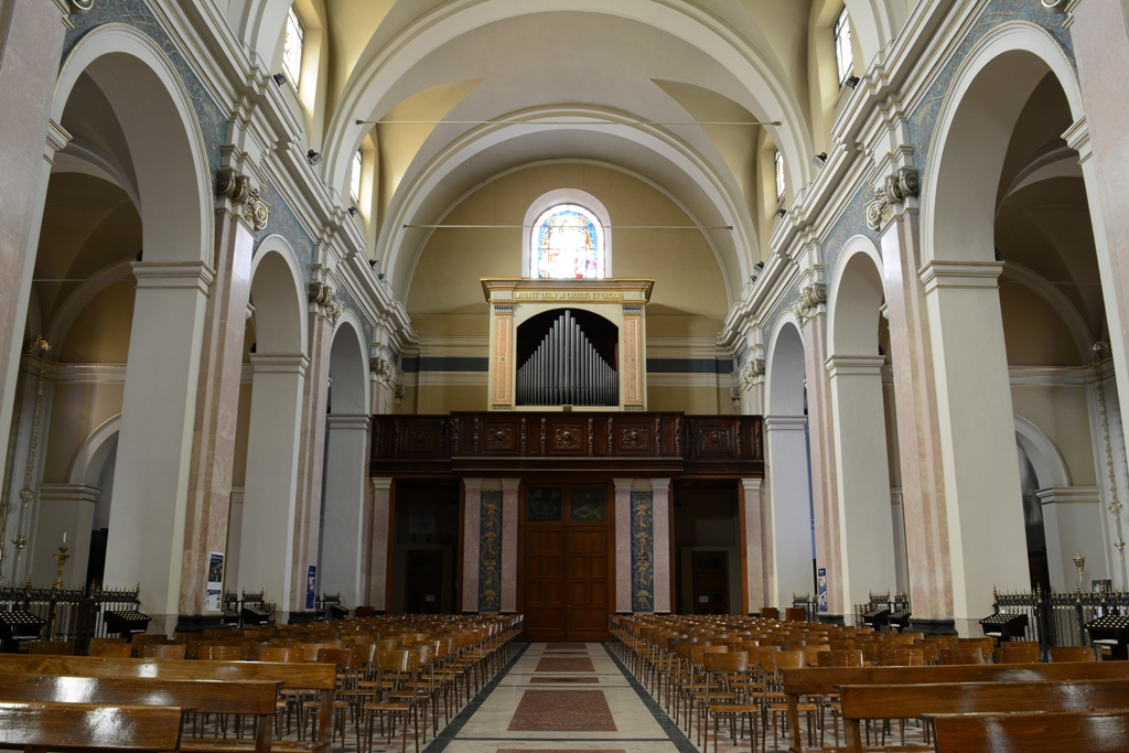 Organo Costruito dai Fratelli Prina nell' anno 1884 nella chiesa parrocchiale di S.Anastasia a Villasanta